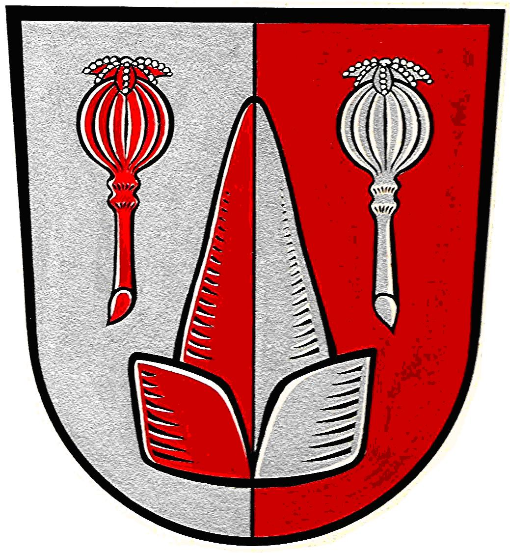 Wappen der Gemeinde Zinzenzell in Bayern (bis zum 30.04.1978)